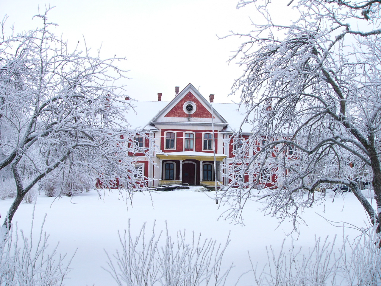 Ravila mõisa peahoone, 19.-20.saj.